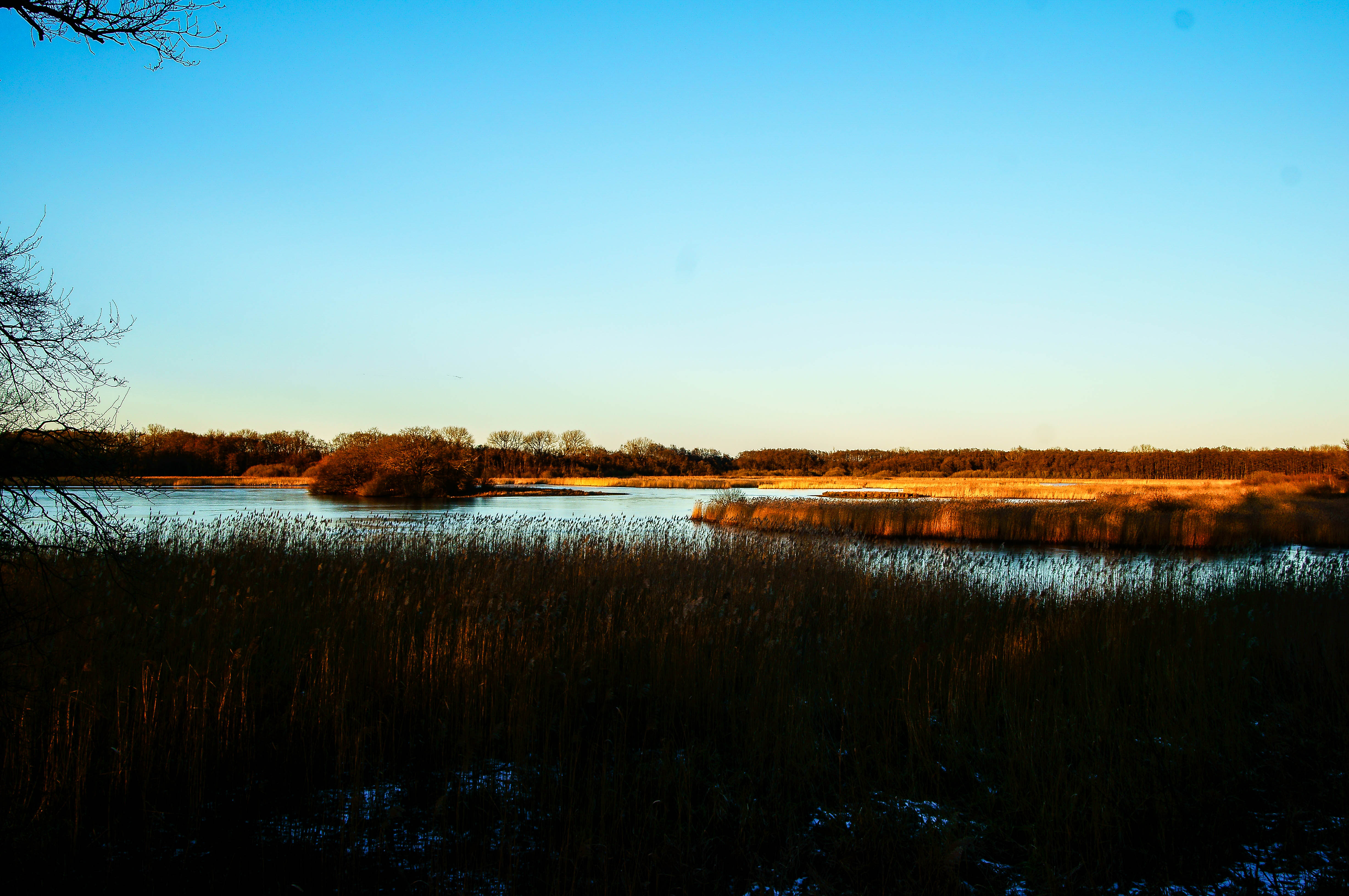 Blick vom Aussichtsturm über den Schapenbruchteich im Naturschutzgebiet „Riddagshausen“, NSG BR 001, in Braunschweig (Niedersachsen, Deutschland).